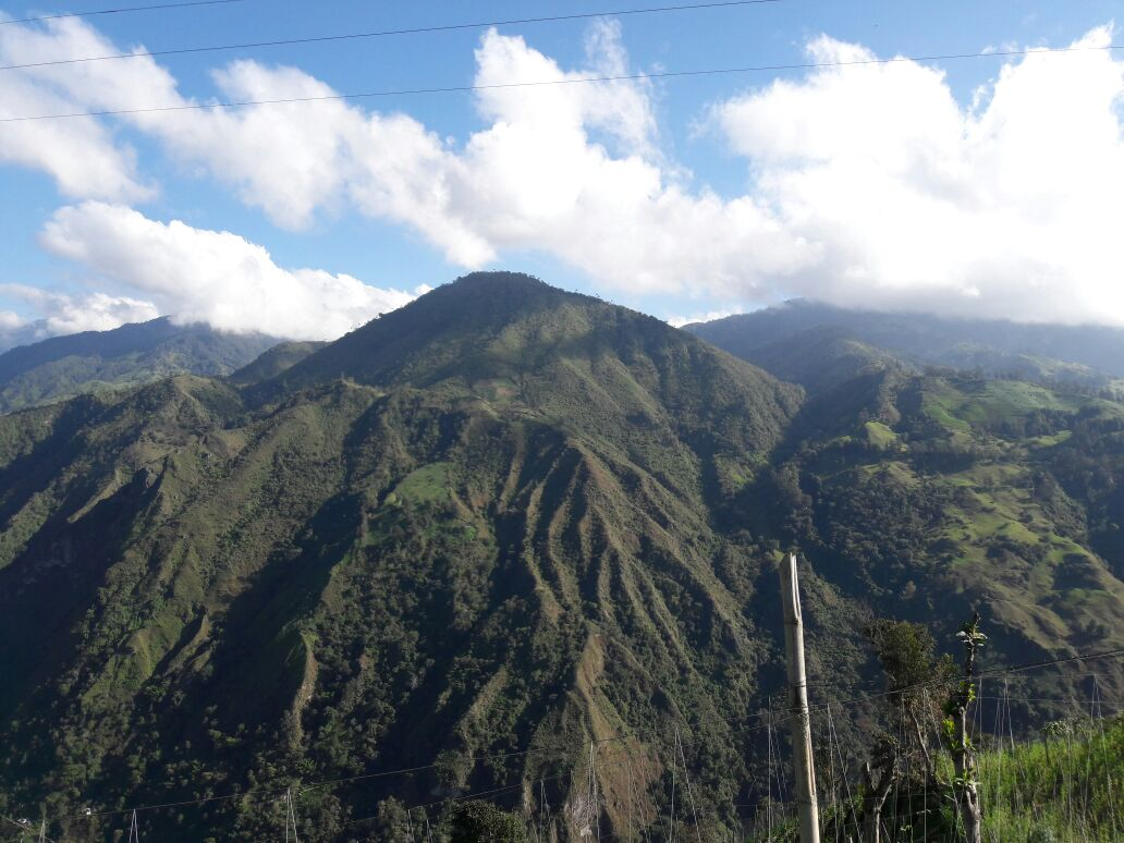 Se observa el cráter del volcán Cerro Machín y el domo dacítico principal.